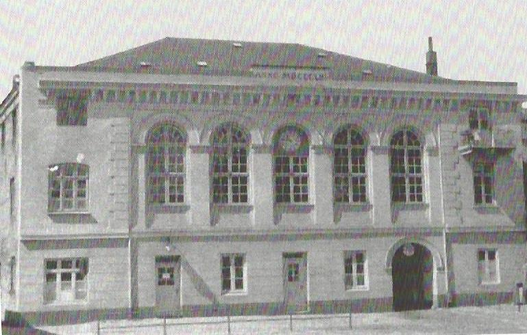 Stændersalen i Stænderhuset Flensborg